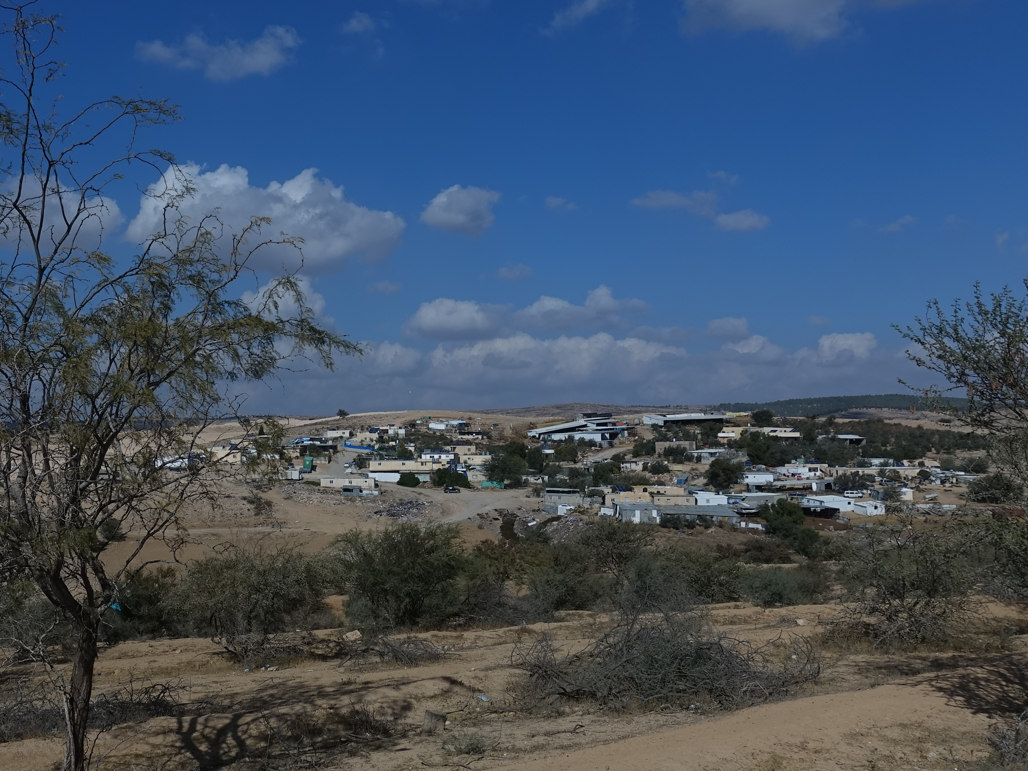 Teilansicht Umm al-Hiran